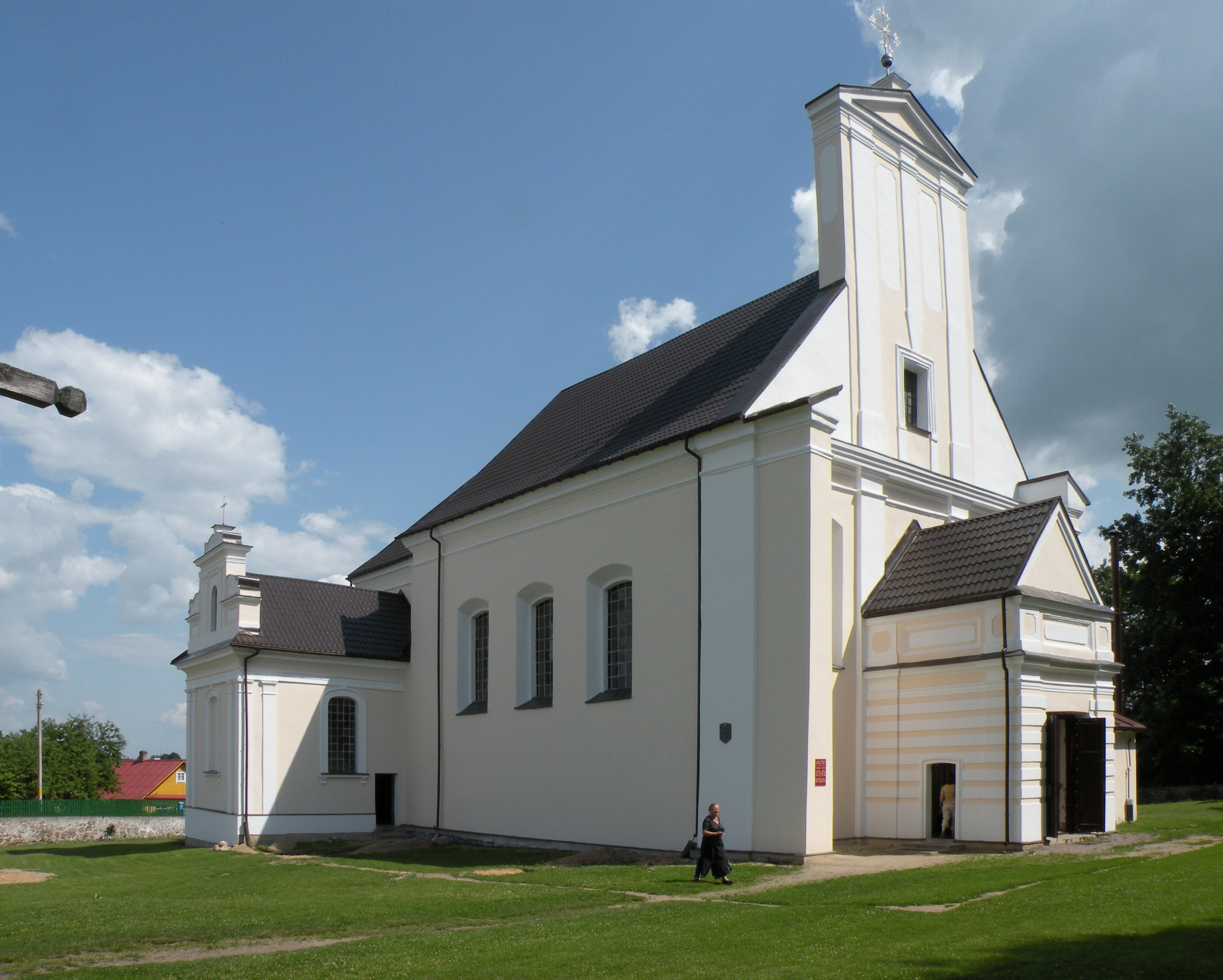 Беларуская (тарашкевіца): Касьцёл Сьв. Мікалая. в. Геранёны This is a photo of Belarusian heritage monument. Reference number: 412Г000293 ( WLM)